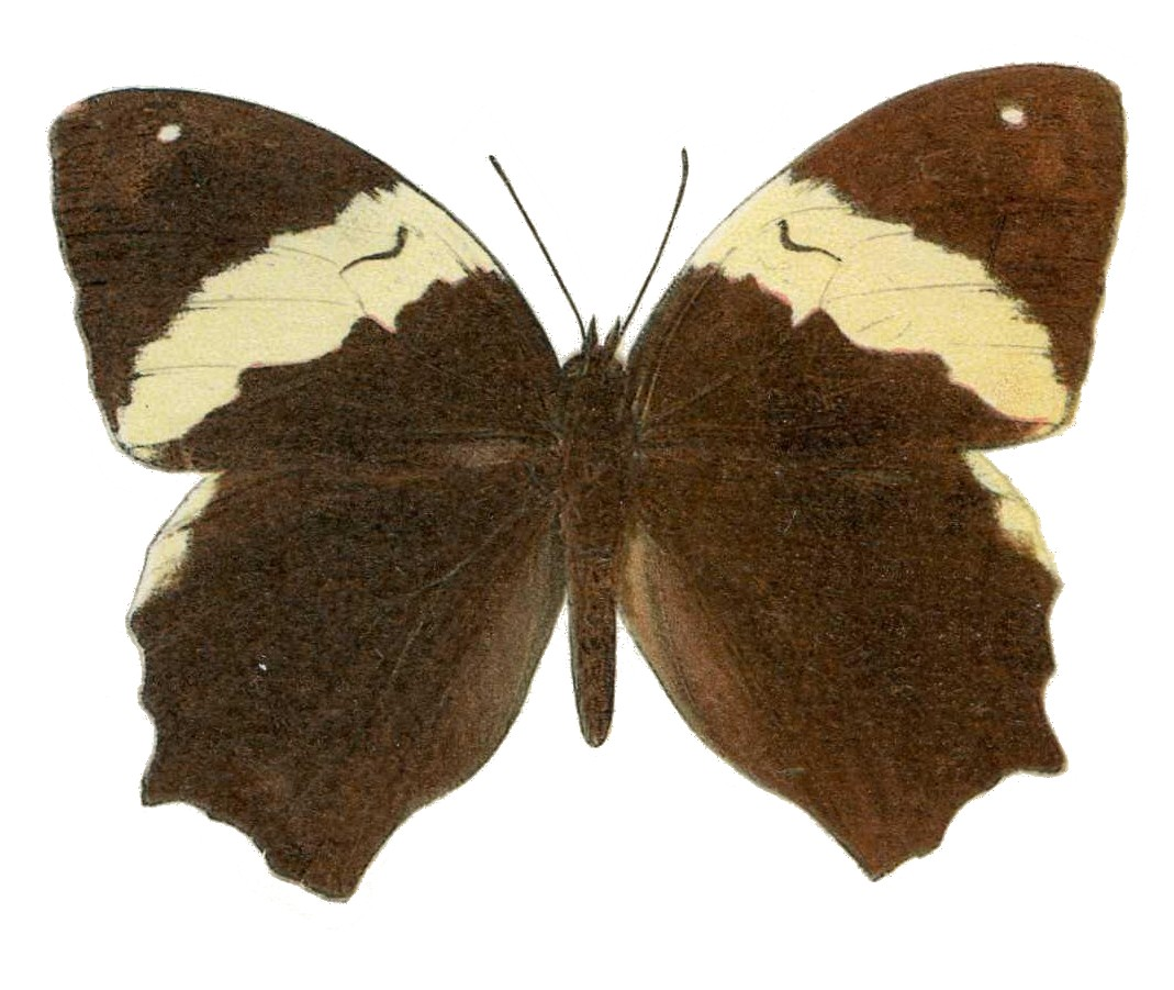 Neorina patria Satyrinae